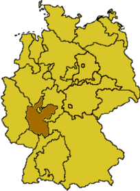 Evangelische Kirche in Hessen und Nassau